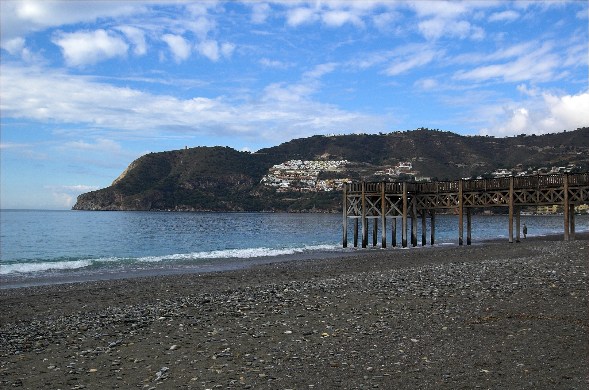 Tomada el 31 de enero de 2007.